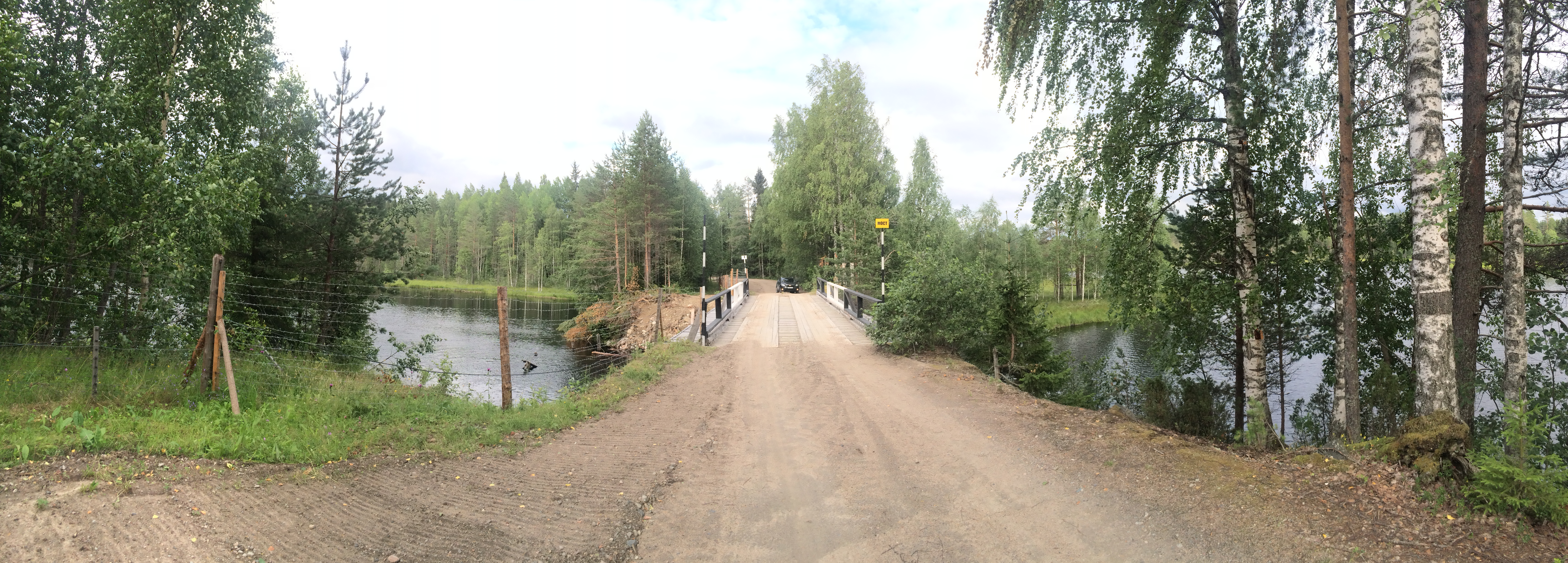 Сютивиермянйоки